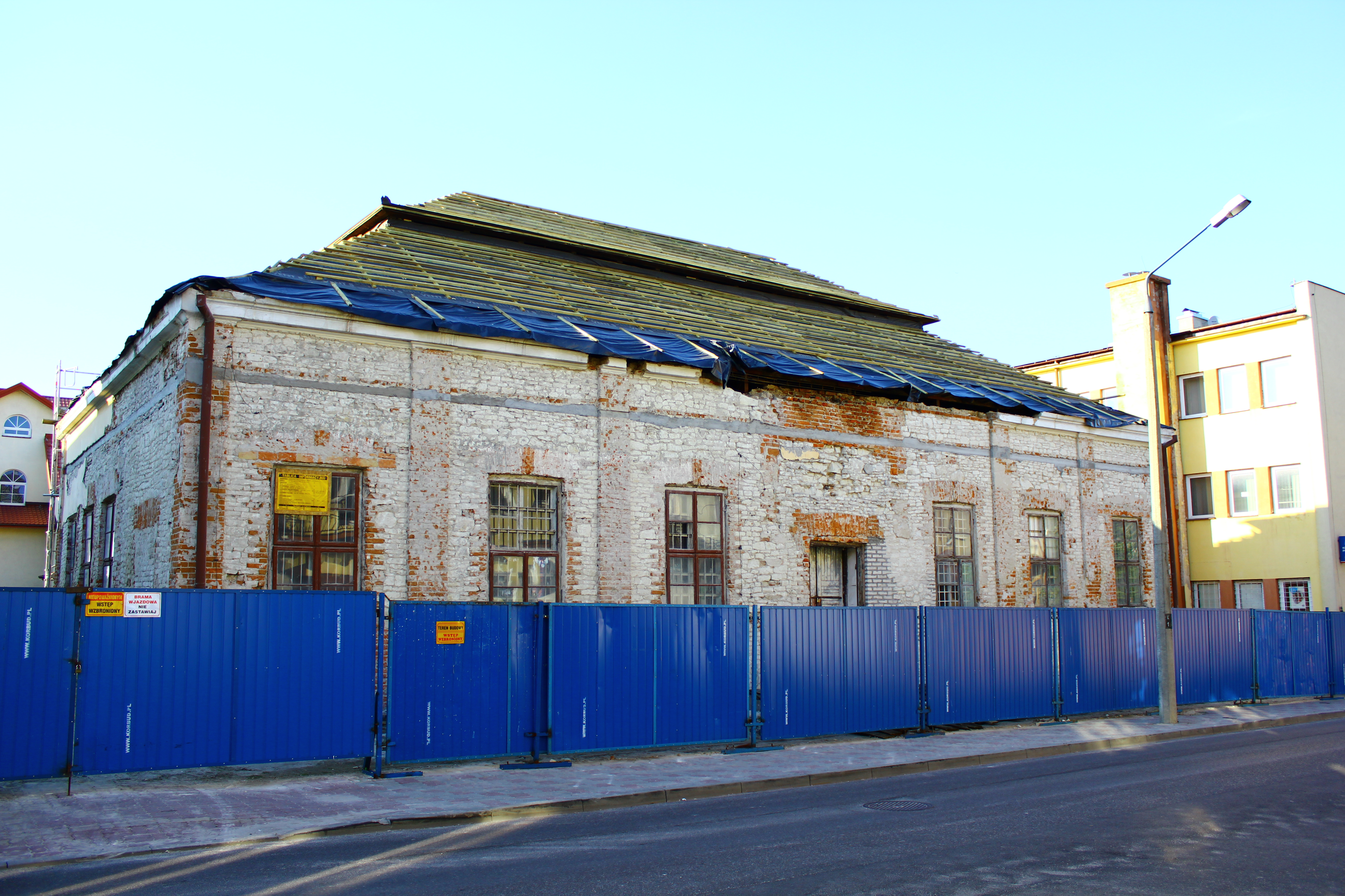 Synagoga w Krasnymstawie podczas prac remontowych